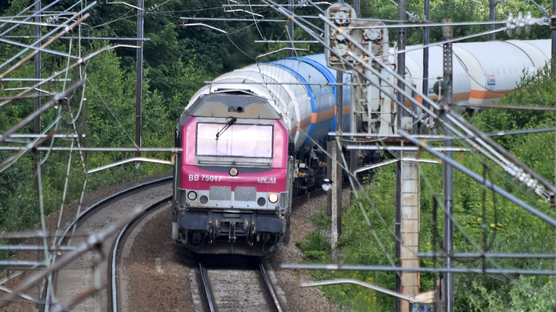 BB 75017 (Lineas) à Longueau